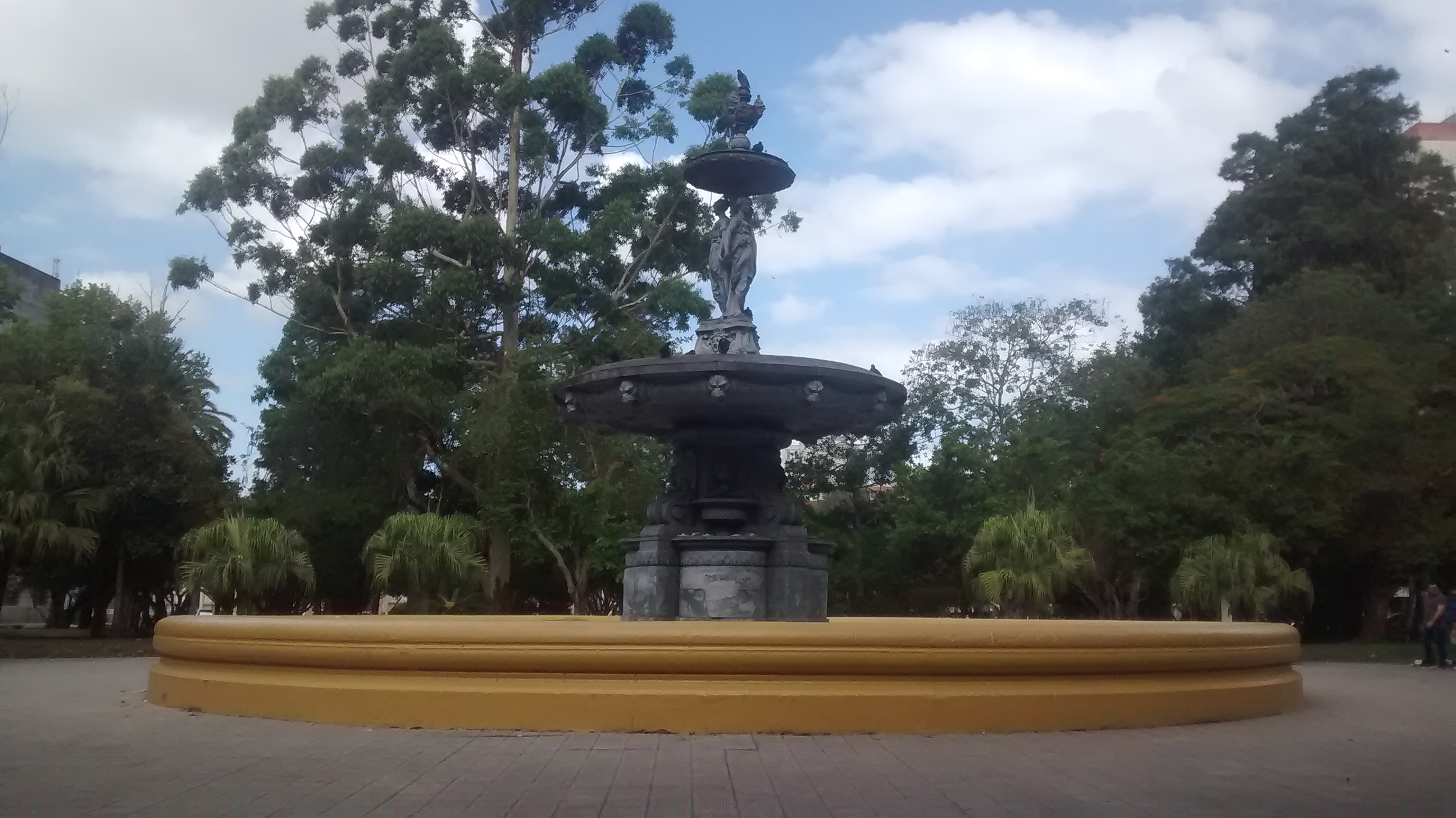 chafariz da Praça Xavier Ferreira - Rio Grande - RS - Brasil